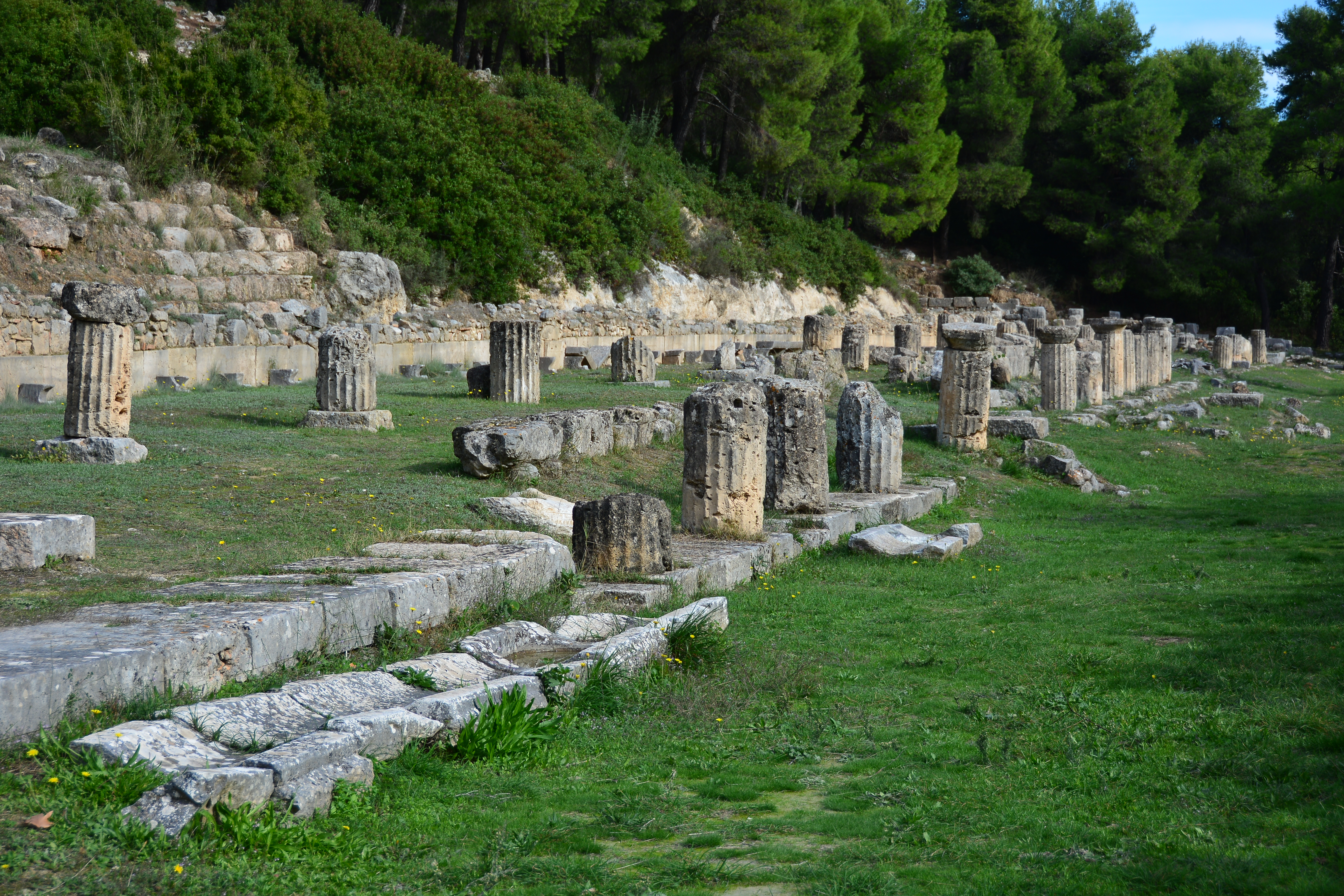 Αμφιάρειο Ωρωπού«Αμφιάρειο Ωρωπού»